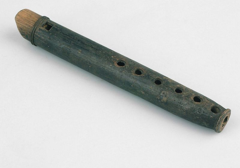 Blaasinstrument. Bekfluit van bamboe met zes vingergaten Unknown language: Singkadoe